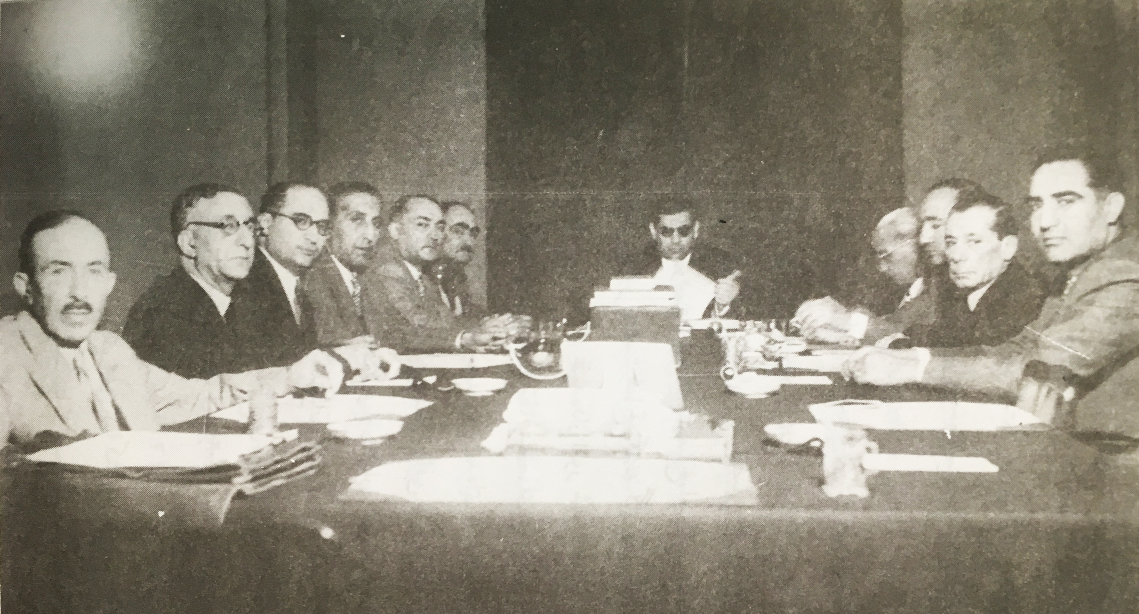 فخرالدین شادمان در کابینه‌ی عبدالحسین هژیر / نفر سوم از چپ